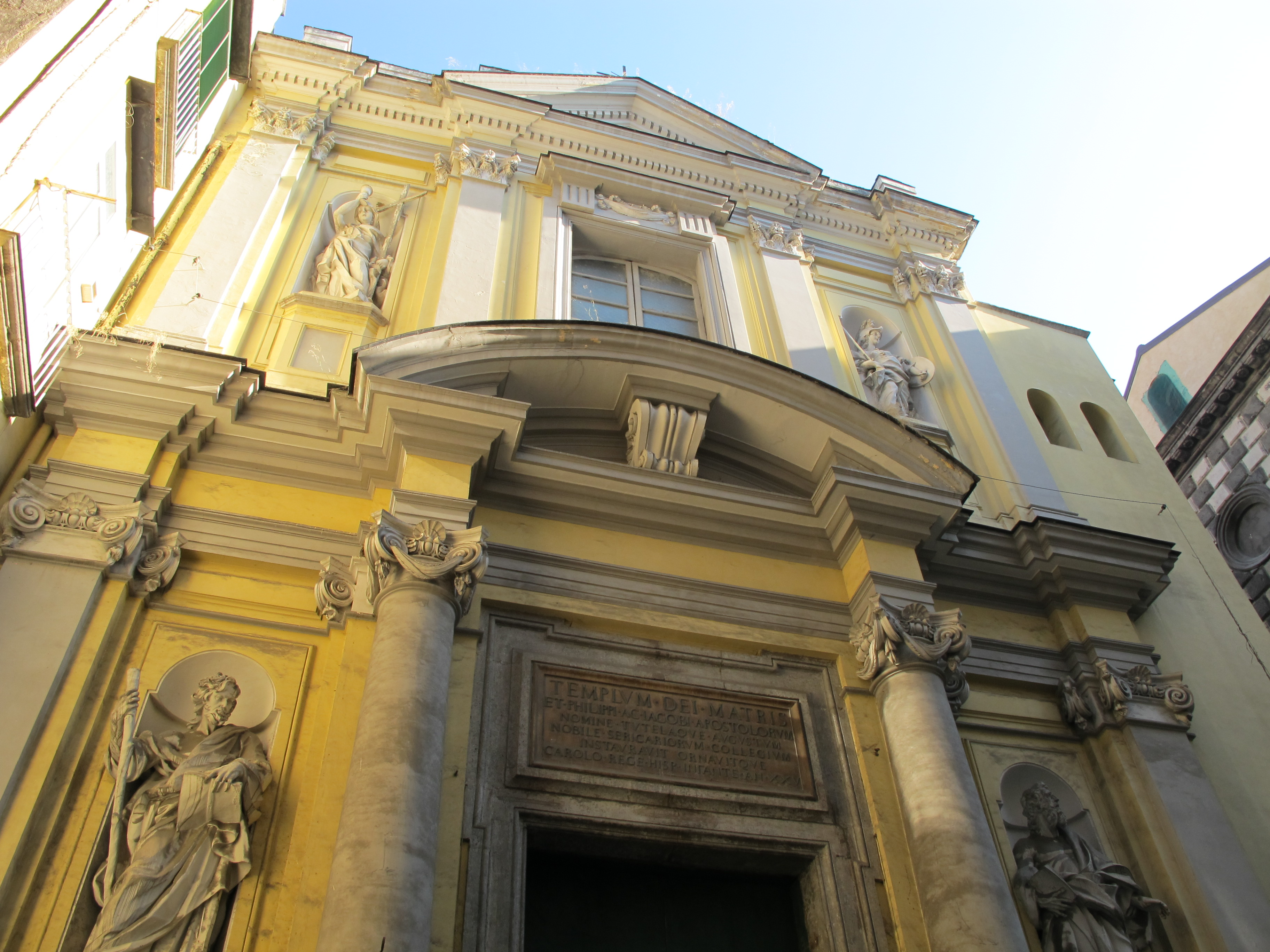 Chiesa di San Filippo e Giacomo (Napoli).